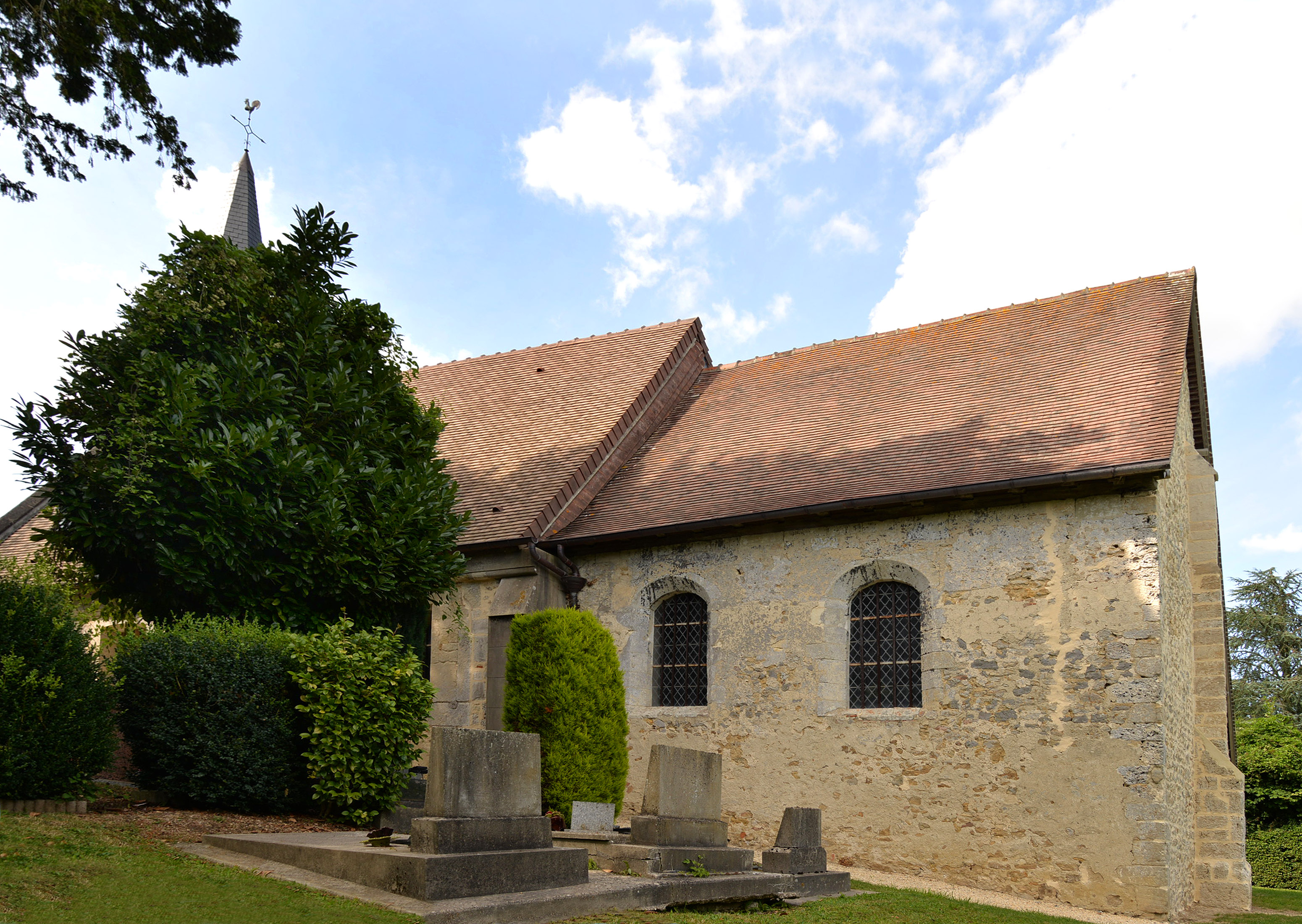 Repentigny (Calvados)